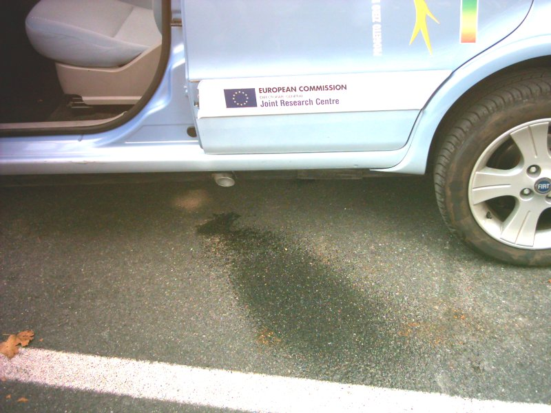 Prototipo Fiat Panda Hydrogen del 2006 fotografato all'Expo "AlternativaMente" di Medole nel 2007